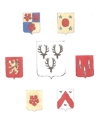 Armorial de Vaugeois sous l'Ancien Régime Argouges, Tréton de Baladé, Mondot, Montreuil,Thomas, Saint Denis, Doynel de Montécot